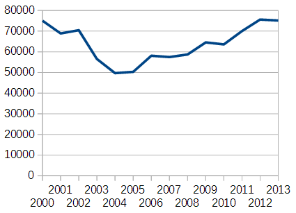 Sources : Les données de 2001 à 2004 inclus viennent du rapport 2010 et varient légèrement.